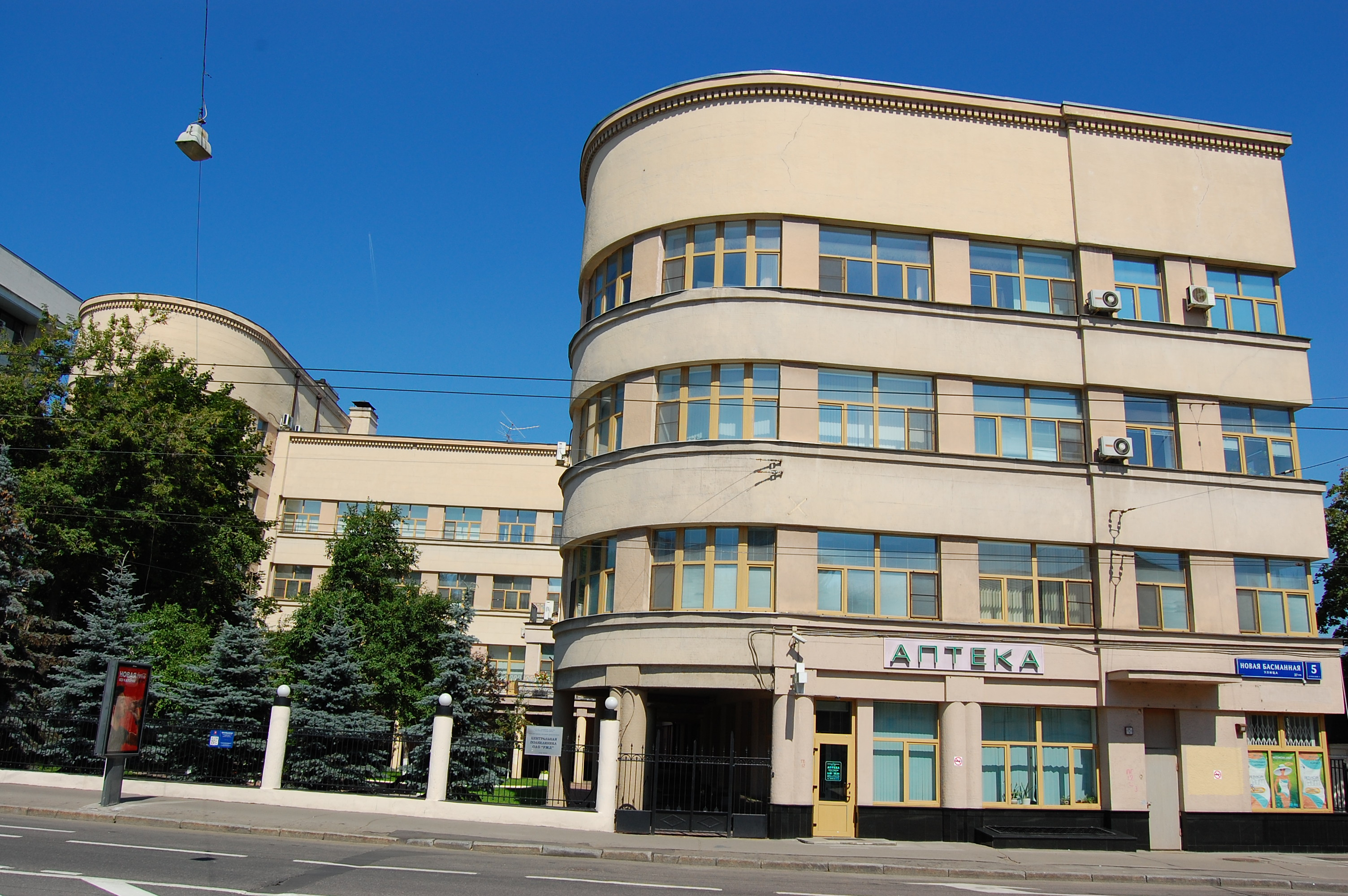 Поликлиника Наркомата путей сообщения